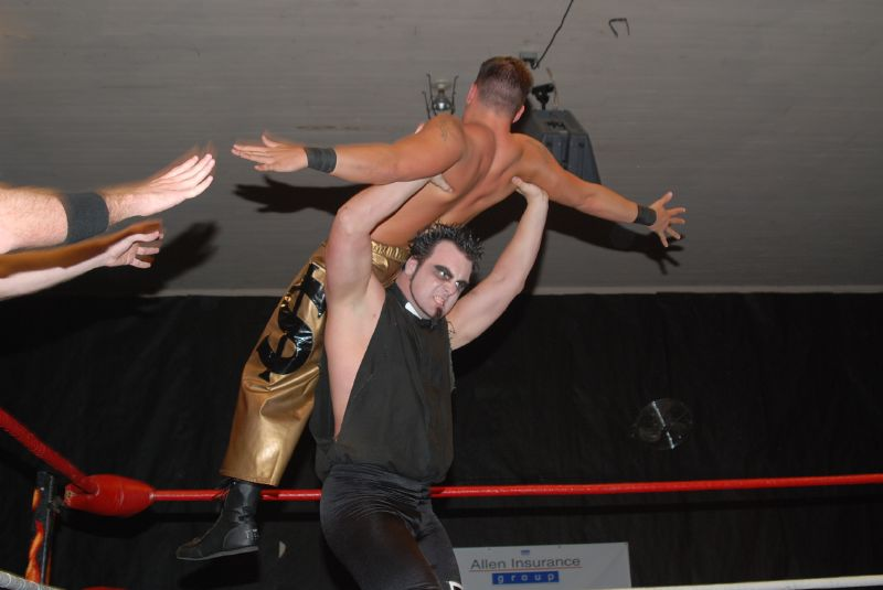 Mikael Judas performing El Crucifijo on Pendleton